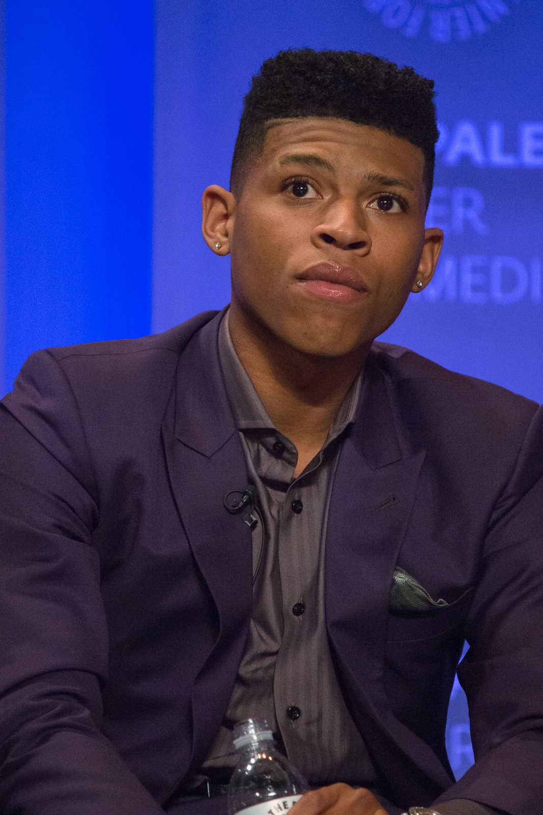 PaleyFest Los Angeles 2016